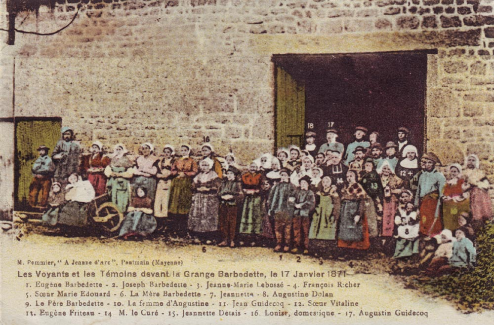 Voyants et temoins devant la grange Barbedette - 17-01-1871